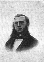 Porträt von Charles Appolinaire Baltet (um 1898)